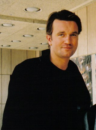 Tomasz Kot (ur. 21 kwietnia 1977 w Legnicy) - polski aktor filmowy